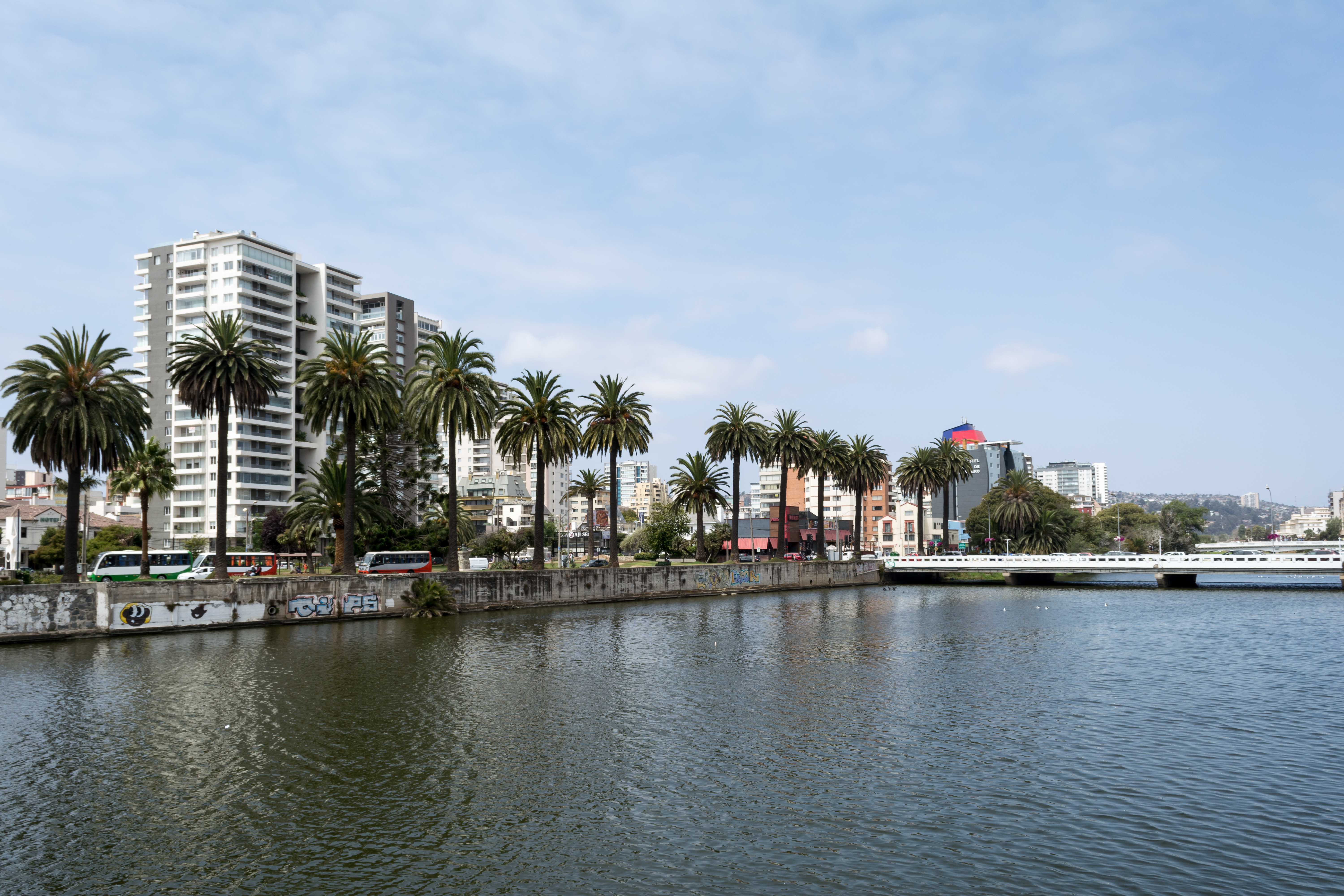 Estero Marga Marga, Viña del Mar, Región de Valparaíso, Chile